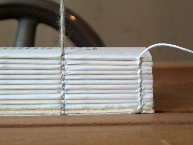 Cahiers reposant sur un cousoir en attente d'être cousus. Une des étapes de la reliure.